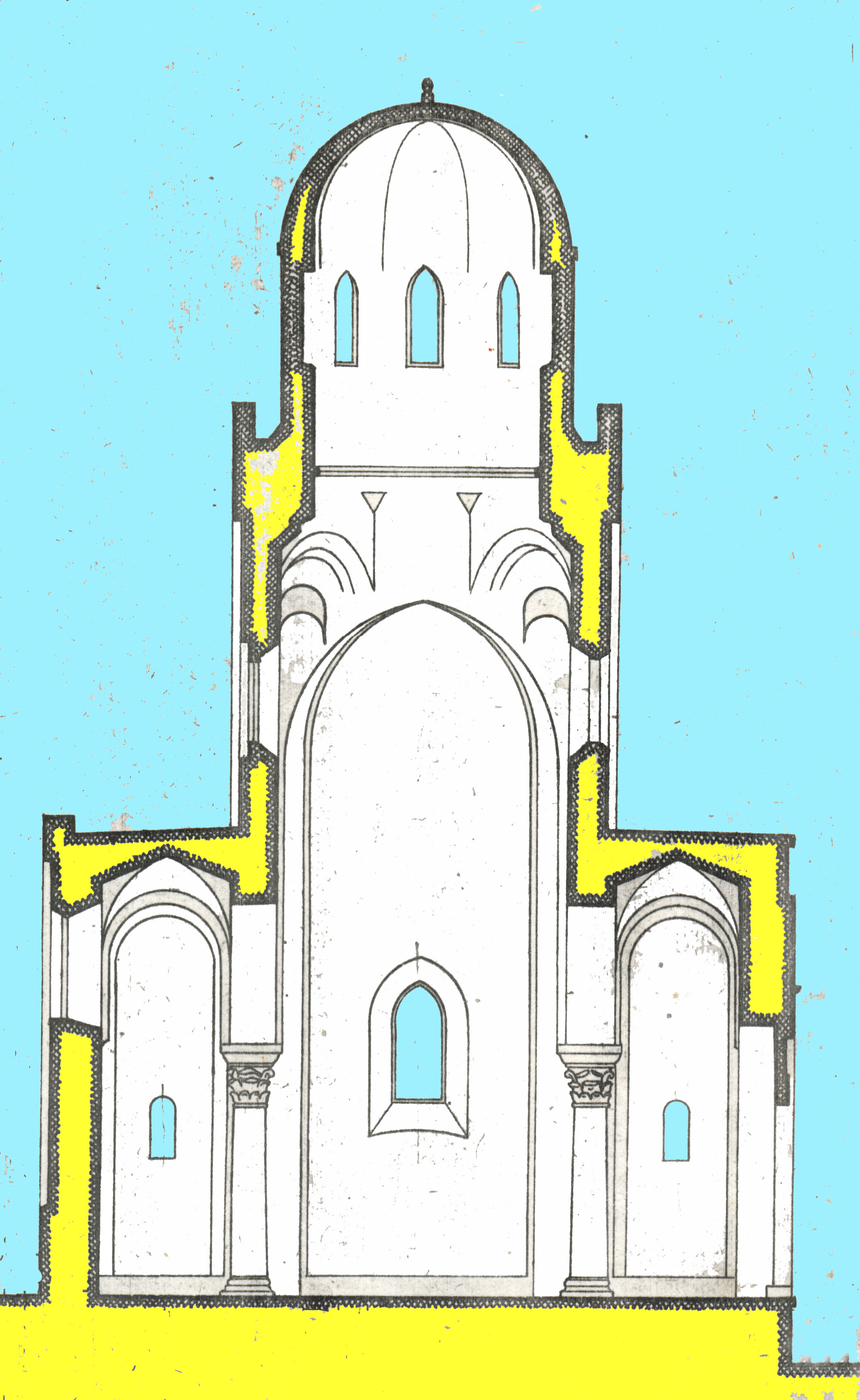 Sezione trasversale della Chiesa dei SS Pietro e Paolo d'Agrò